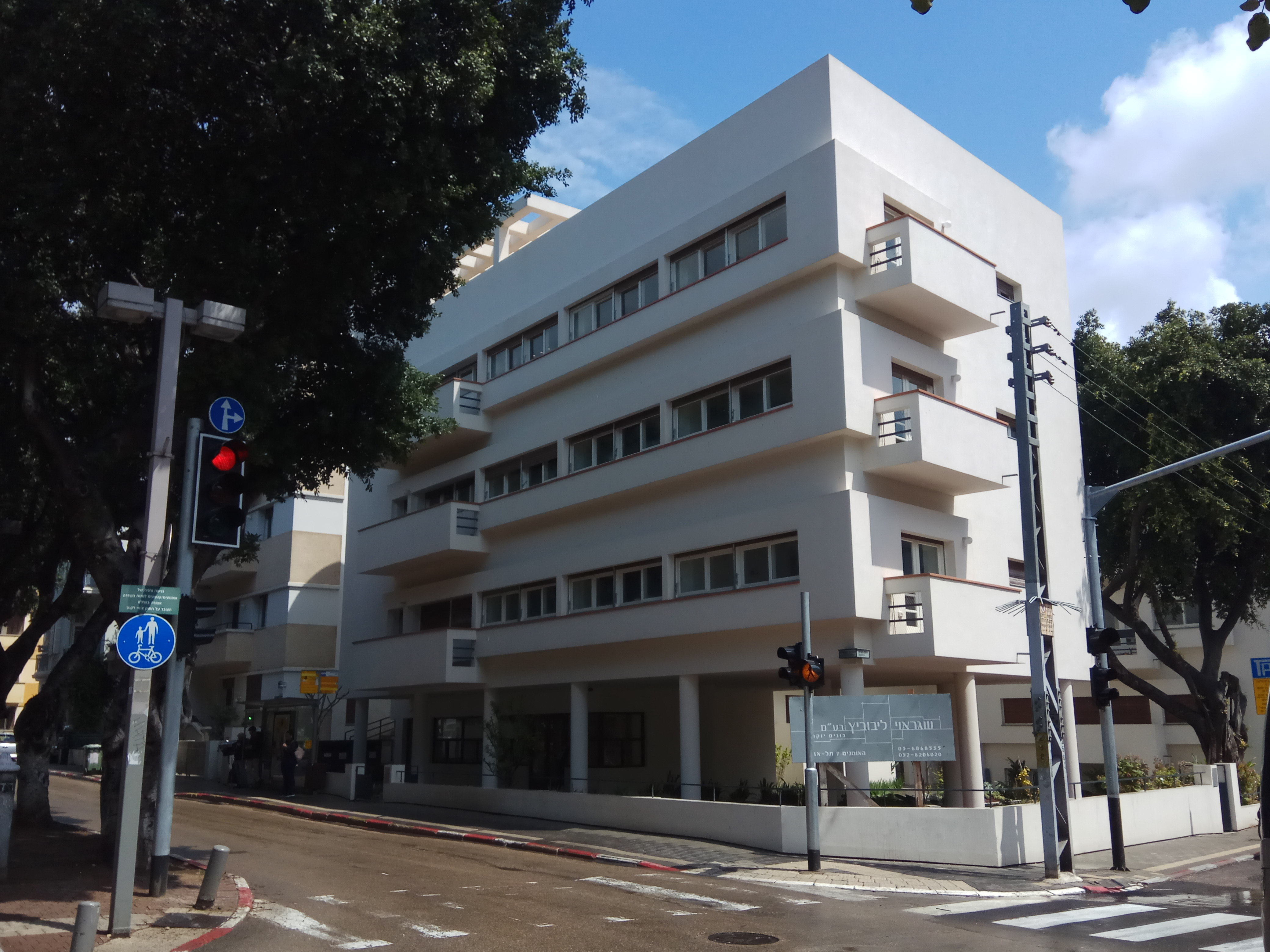 בית אנגל בשדרות רוטשילד בתל אביב